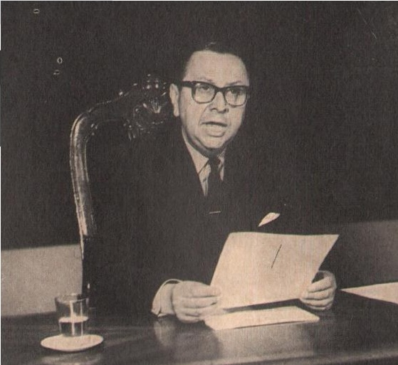 Luis María Gotelli como secretario de energía de la nación (1962-63).